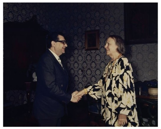 Il presidente della Camera dei Deputati Nilde Iotti riceve Antonio La Pergola nuovo Presidente della Corte Costituzionale